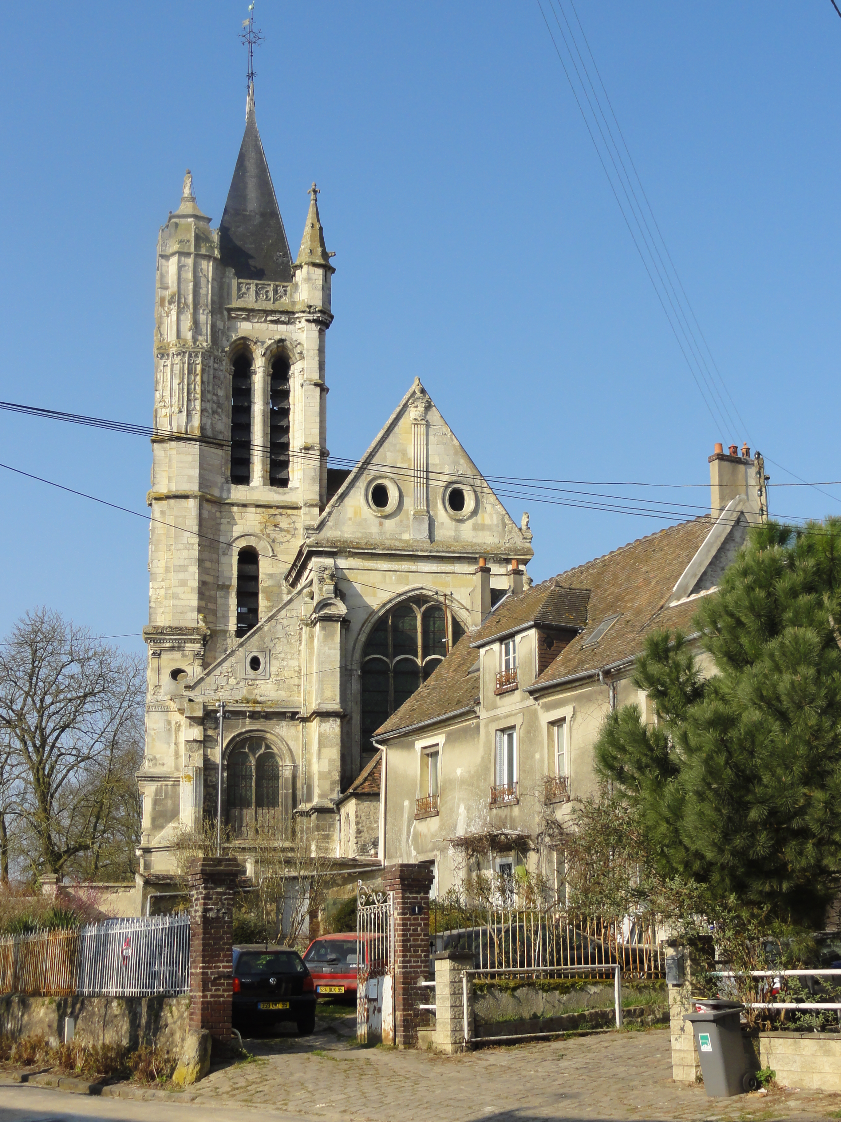 Voir titre.